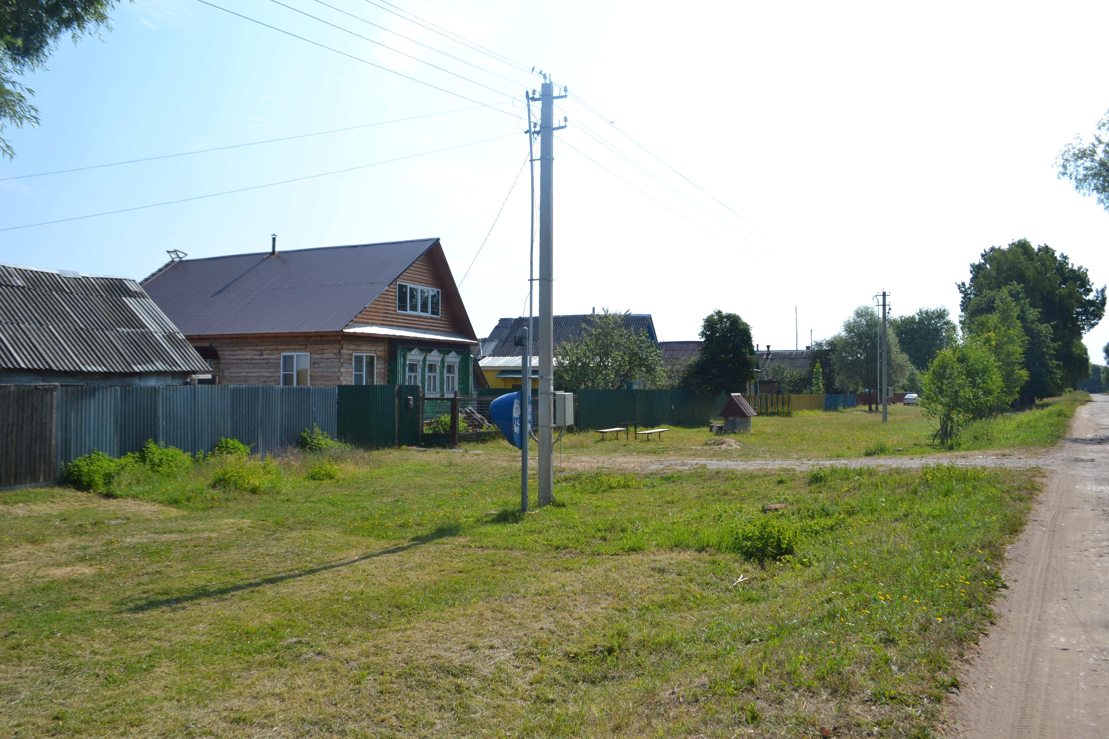 Таксофон в деревне Харлампеево (Шатурский район)